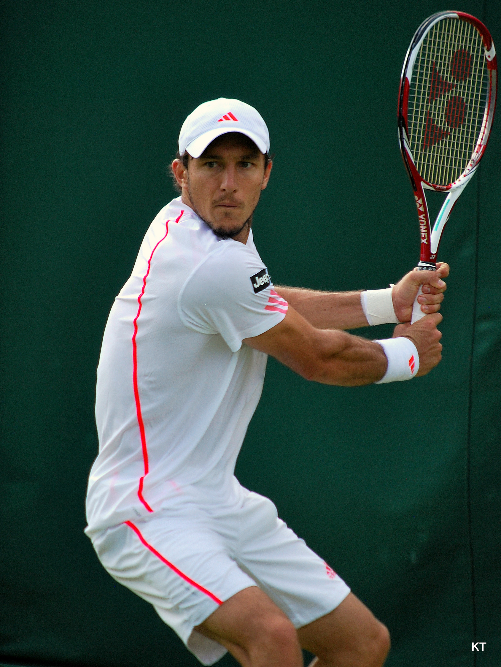 Juan Monaco